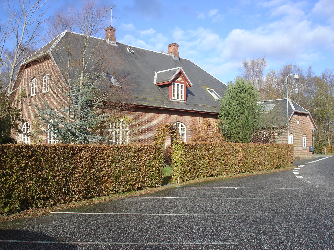 Gjern Station fra vejsiden